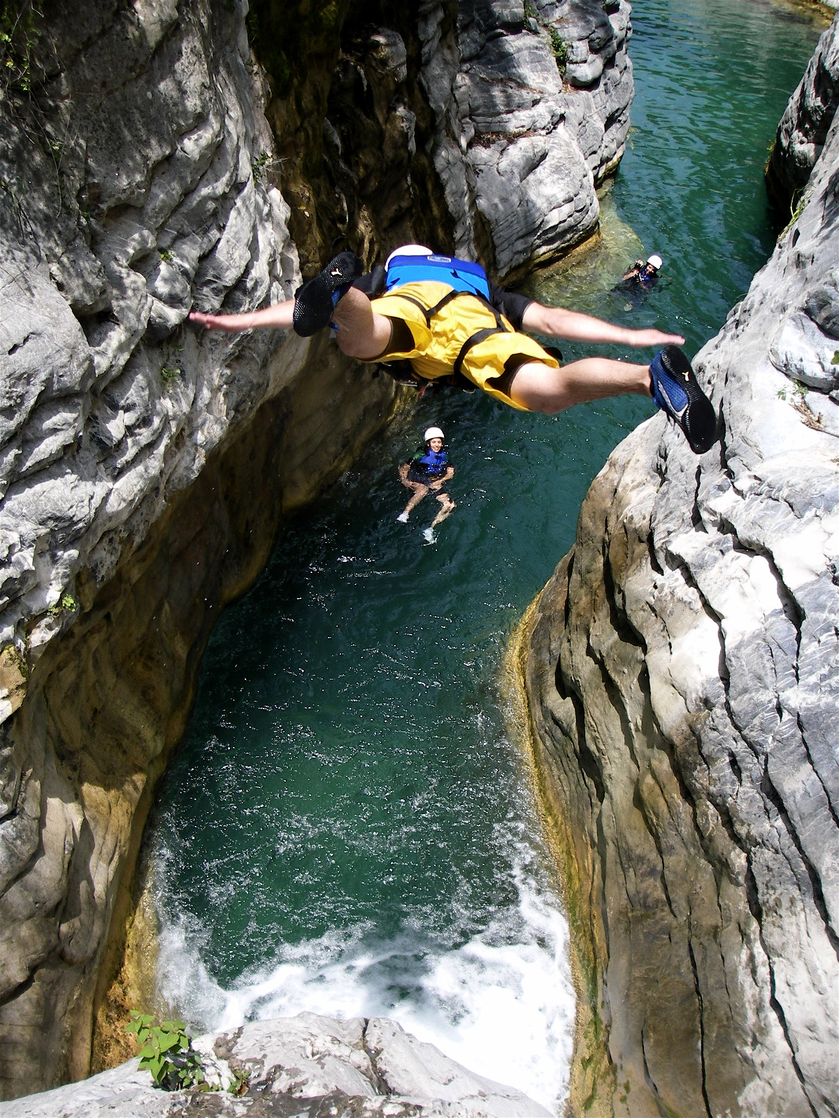 Salto en Matacanes (Cañón de Las Adjúntas)